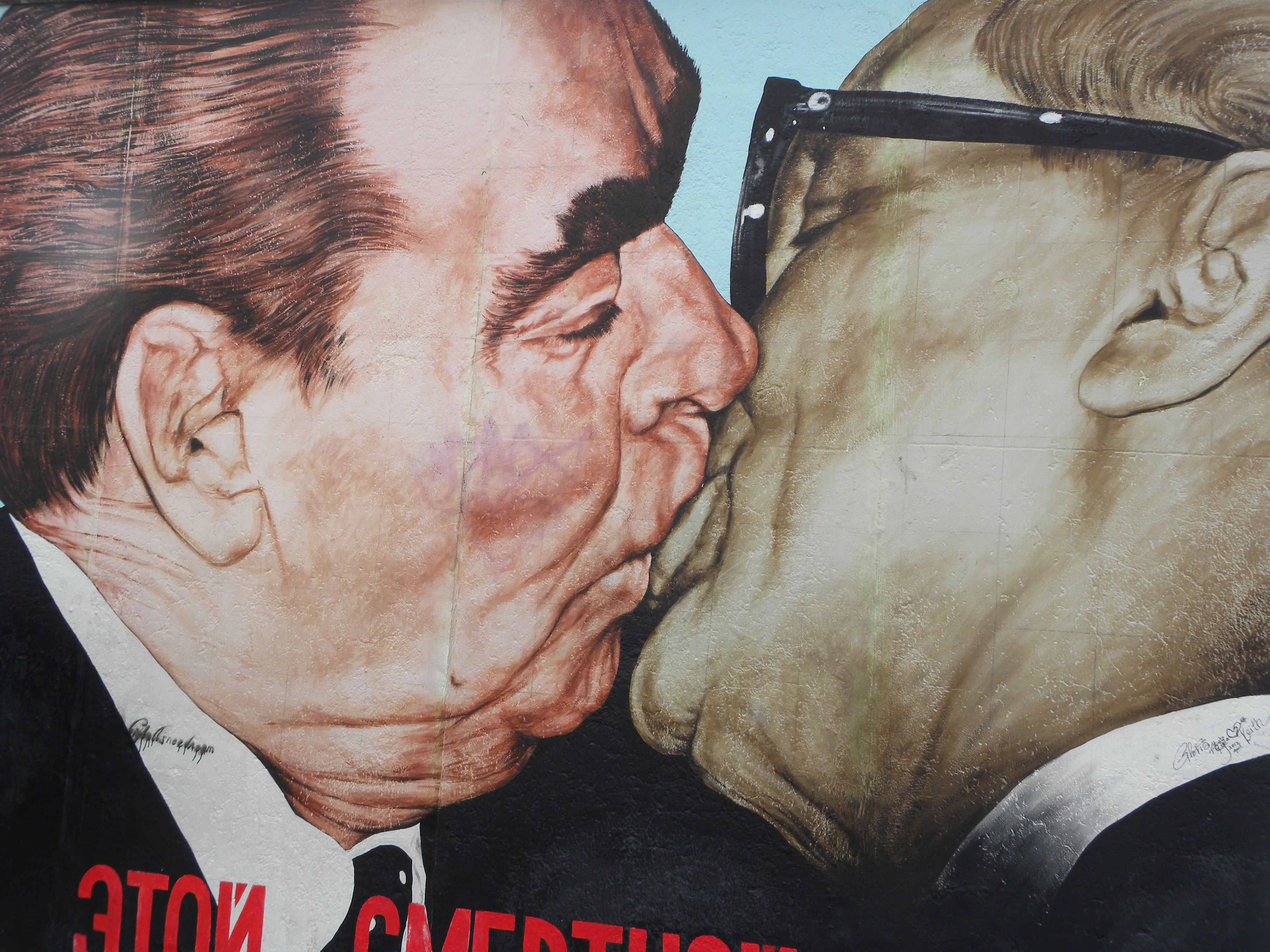 Bruderkuss